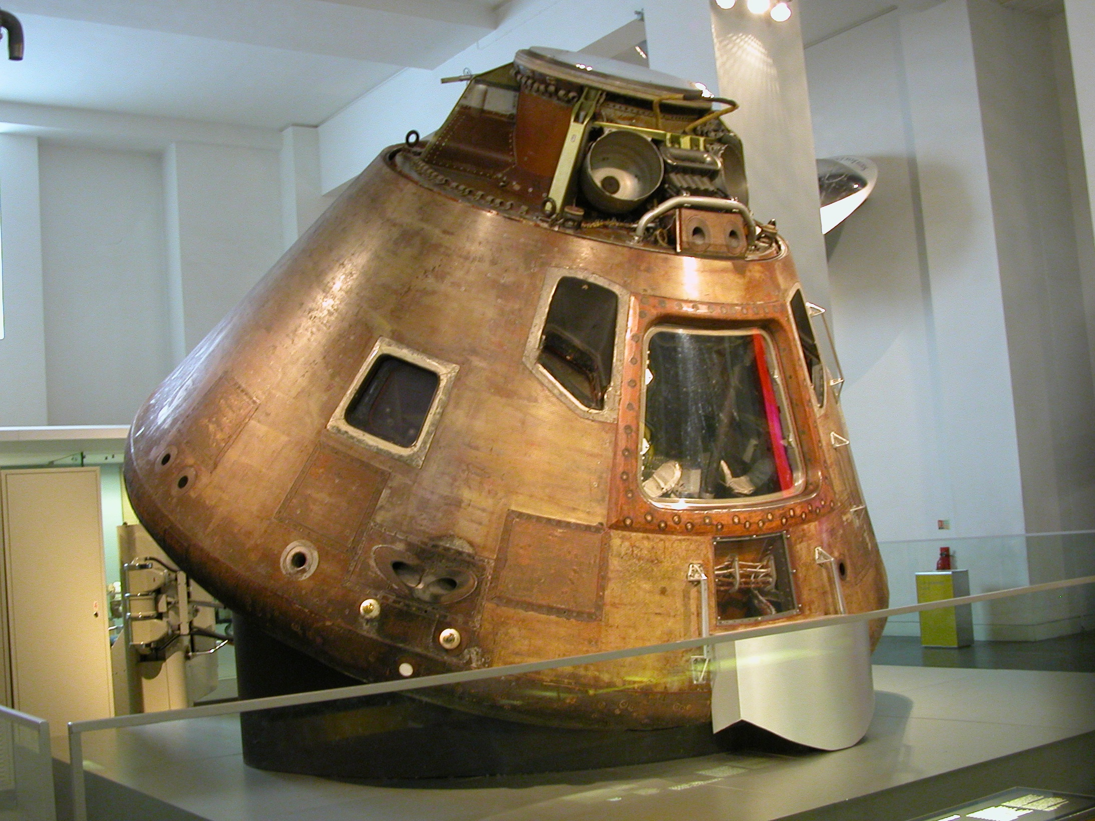 Description Module de Commande de la mission Apollo X exposé au Musée des Sciences de Londres (Mai 2009) DateMay 2009SourceOwn work by the original uploaderAuthorBruno Barral (ByB) Module de Commande de la mission Apollo X exposé au Musée des Sciences de Londres (Mai 2009)